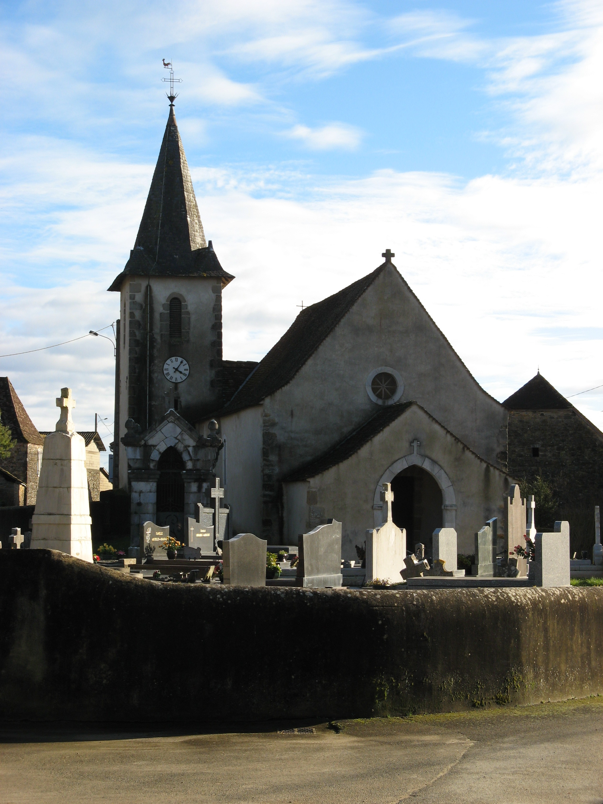 Eglise,place du village - commune d'Ossenx - 64190